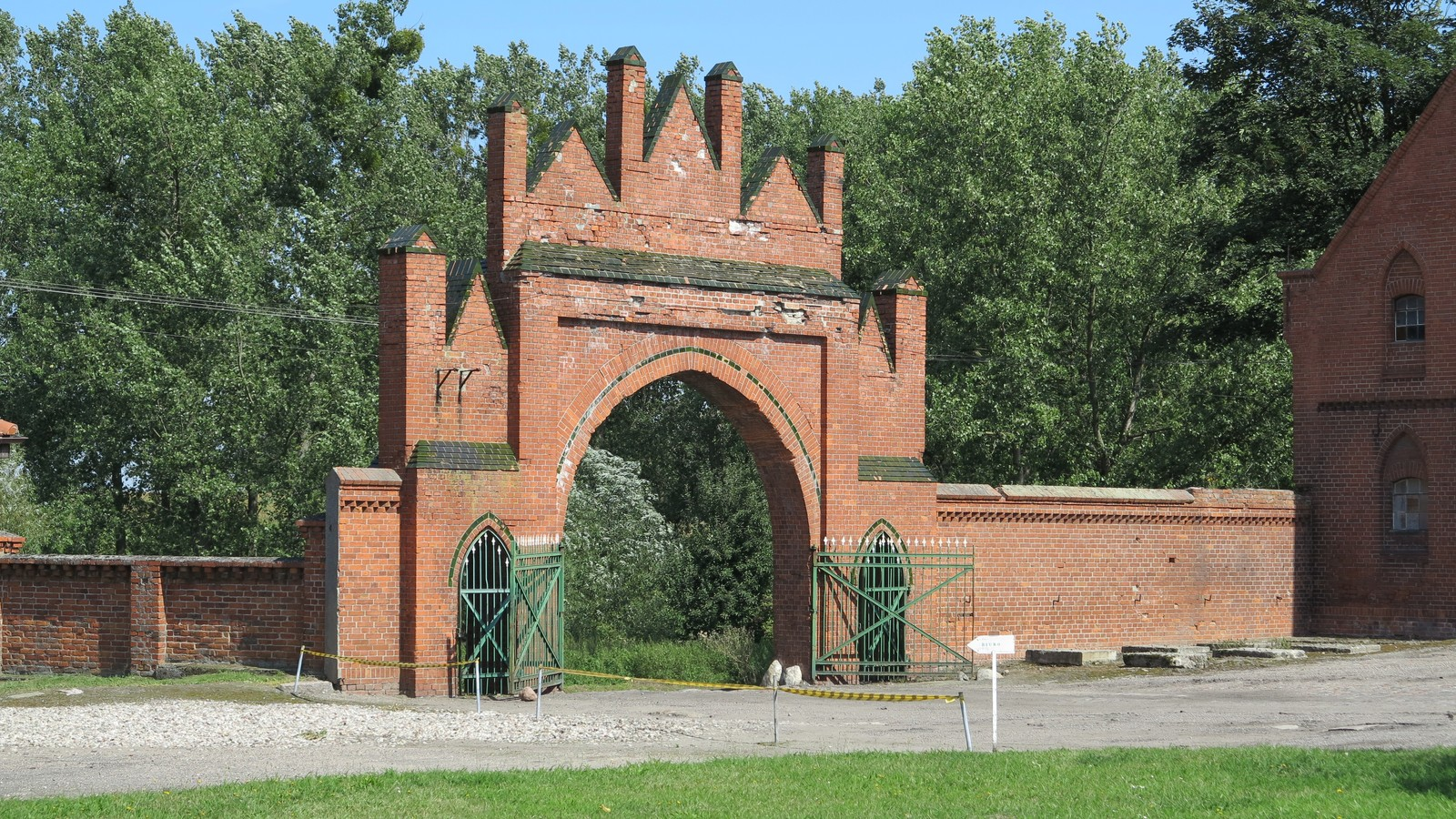 Mełno ogrodzenie